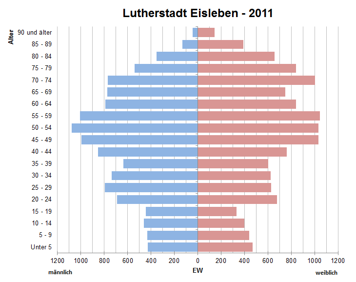 Bevölkerungspyramide der Lutherstadt Eisleben nach Zensus 2011.